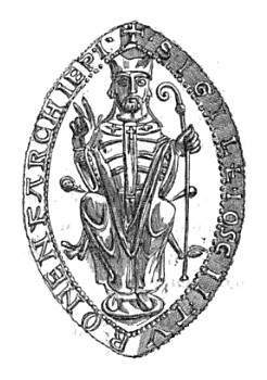 Joscion